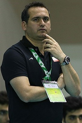 حسین معدنی در دیدار تیم های والیبال ایران و کویت از سری مسابقات آسیایی کشورهای اسلامی در اندونزی